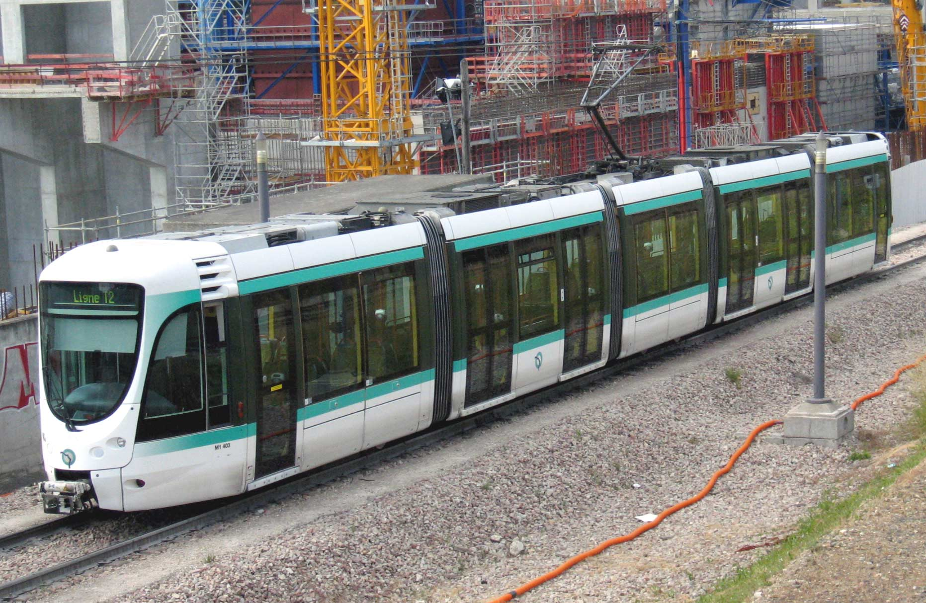 Description : Rame tramway ligne T2 en cours de retournement au terminus d'Issy Place : Issy, Paris, France Date : juin 2006 Author : Pline photo personnelle